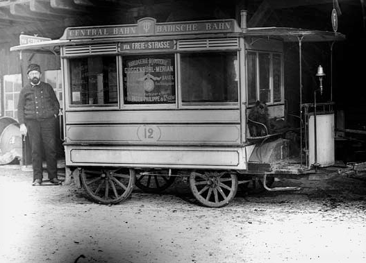 Basler Pferdeomnibus-Wagen Nr. 12, auf dem Kutschersitz der Spitz-Rüde Philax